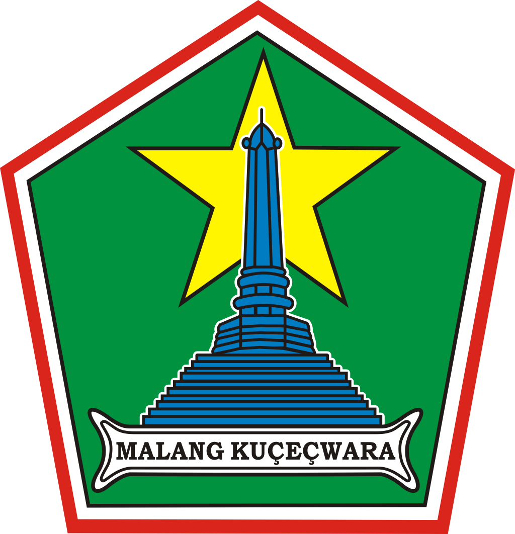 Logo Kota Malang revisi oleh Dani Maroe Beni